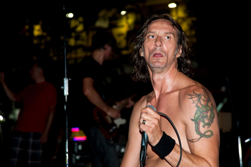 Davor Gobac i Psihomodo pop